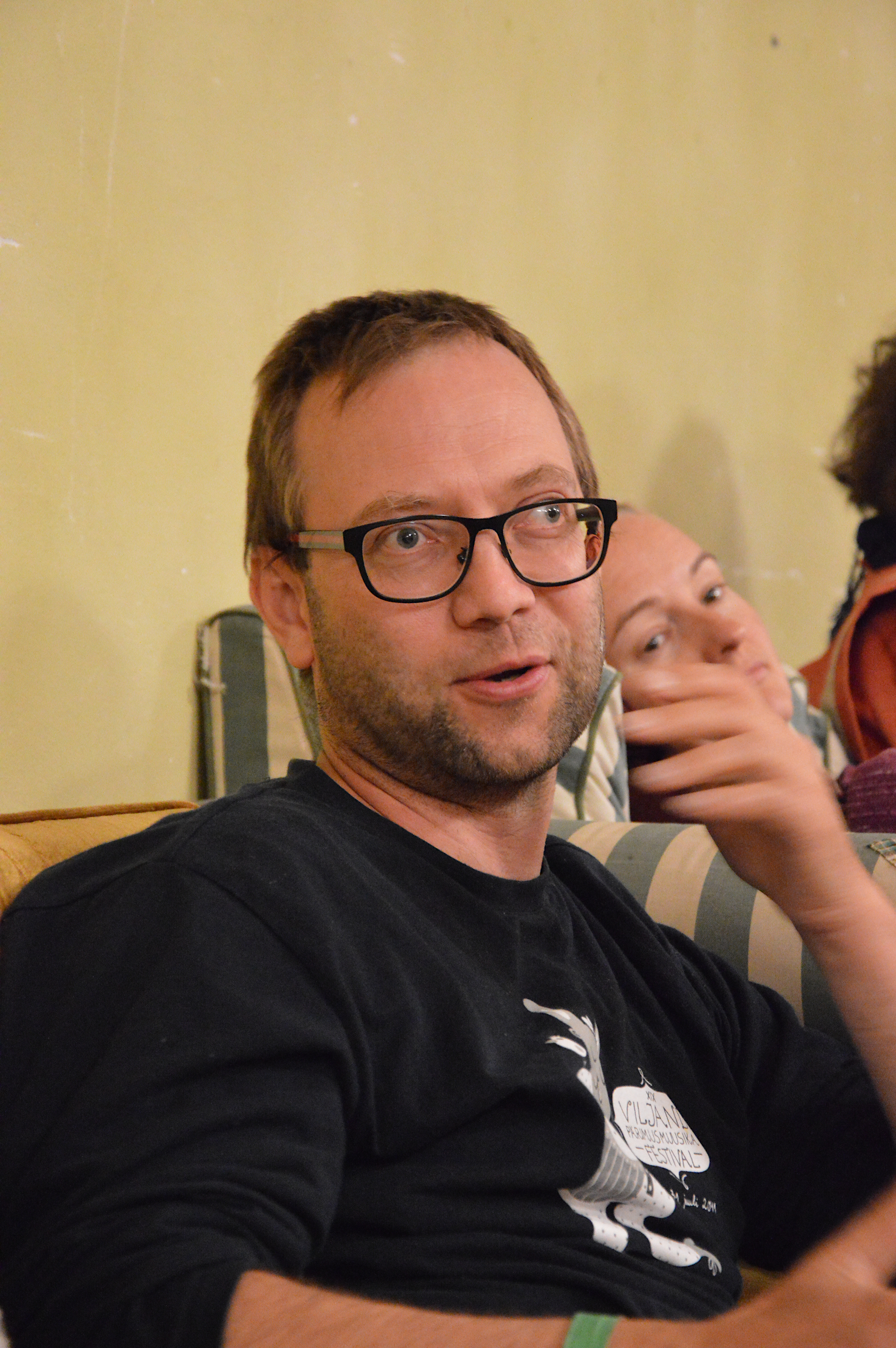 Jaan Tootsen 2020. aasta soome-ugri filmifestivalil Sännas.